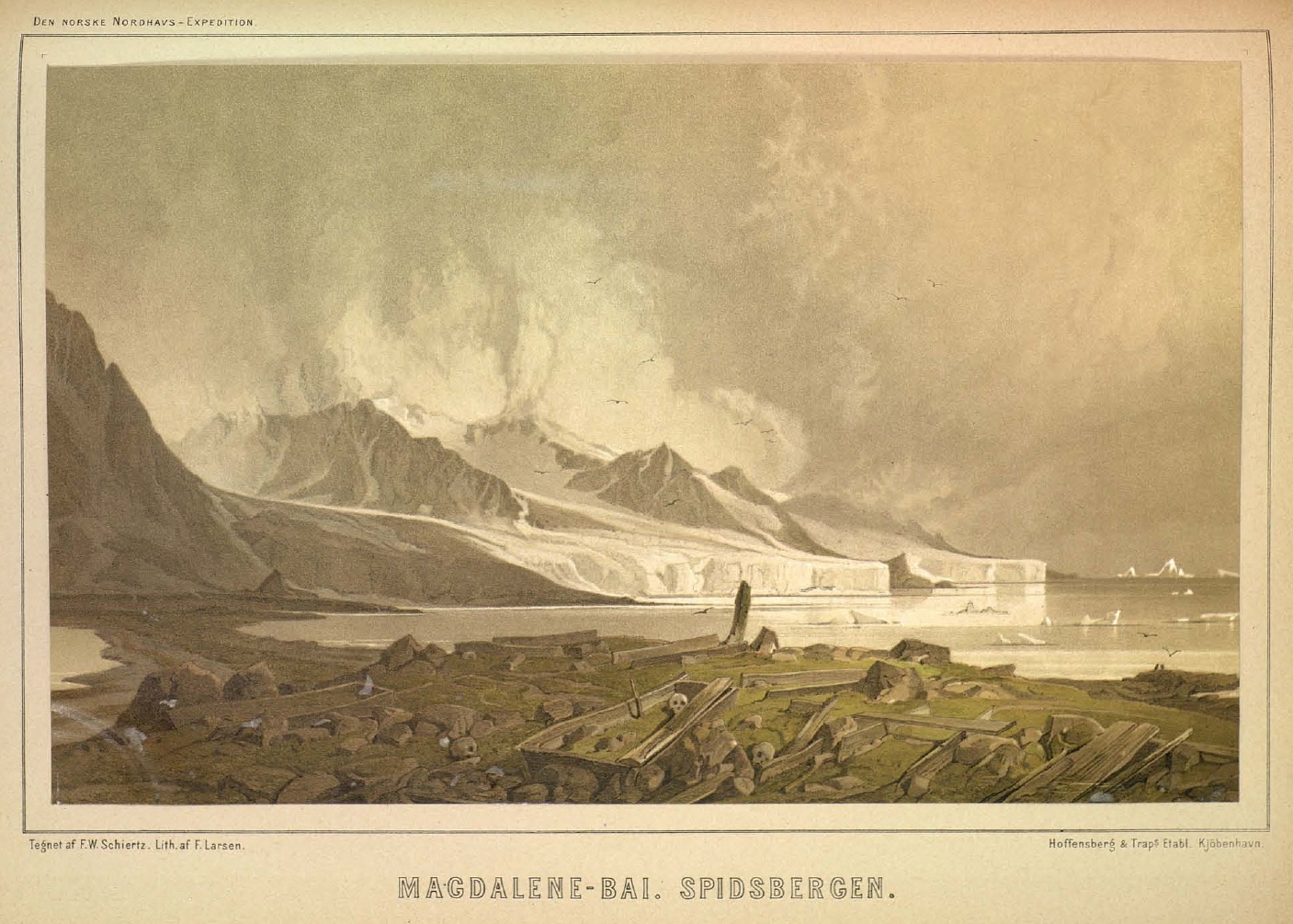 Franz Wilhelm Schiertz: Magdalene-Bai. Spidsbergen